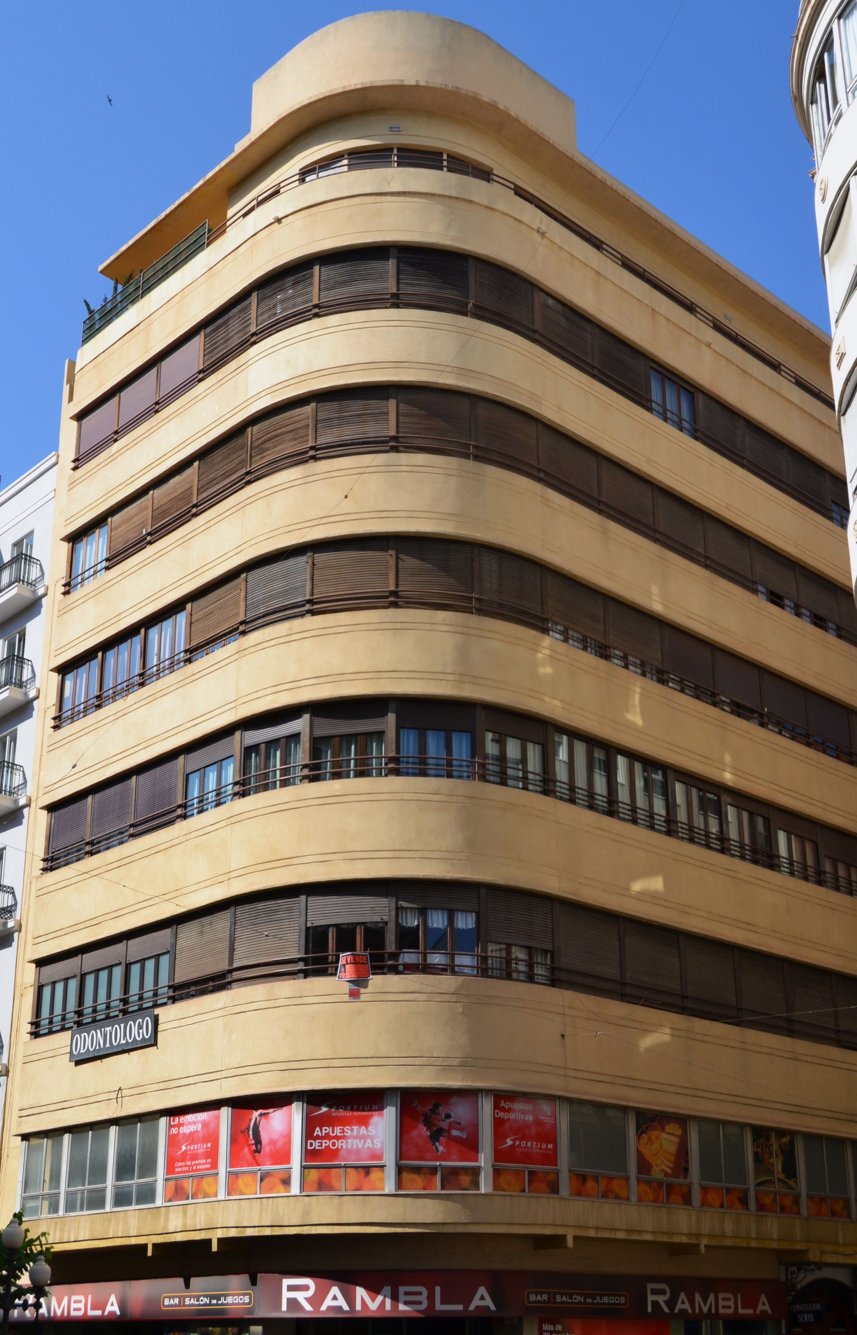 Edifici l'Adriàtica, Alacant.